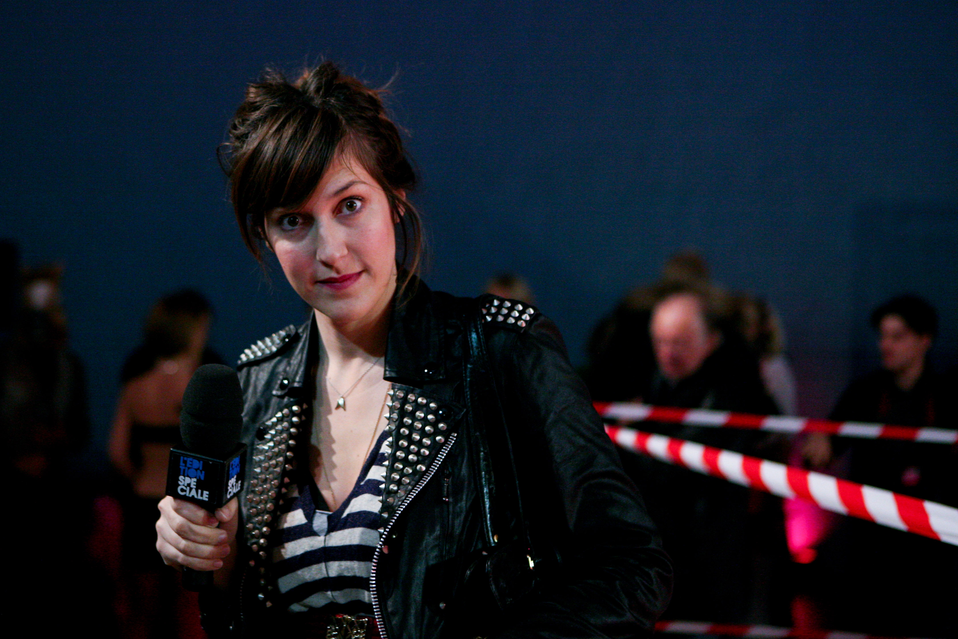 Daphné Bürki, journaliste sur Canal+